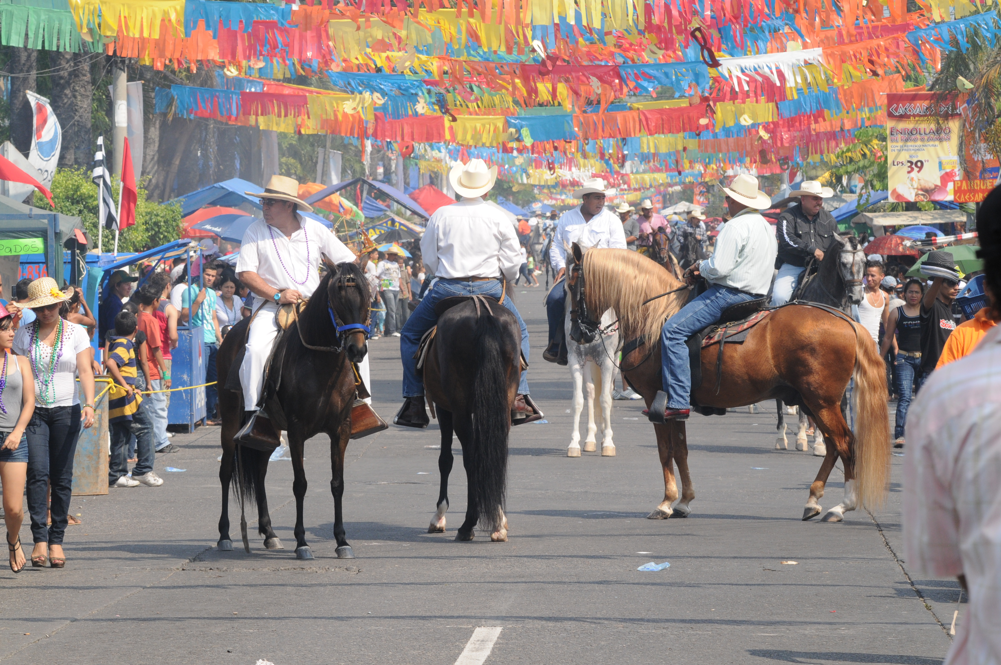 Desfile de caballos Carnaval de La Ceiba,2011